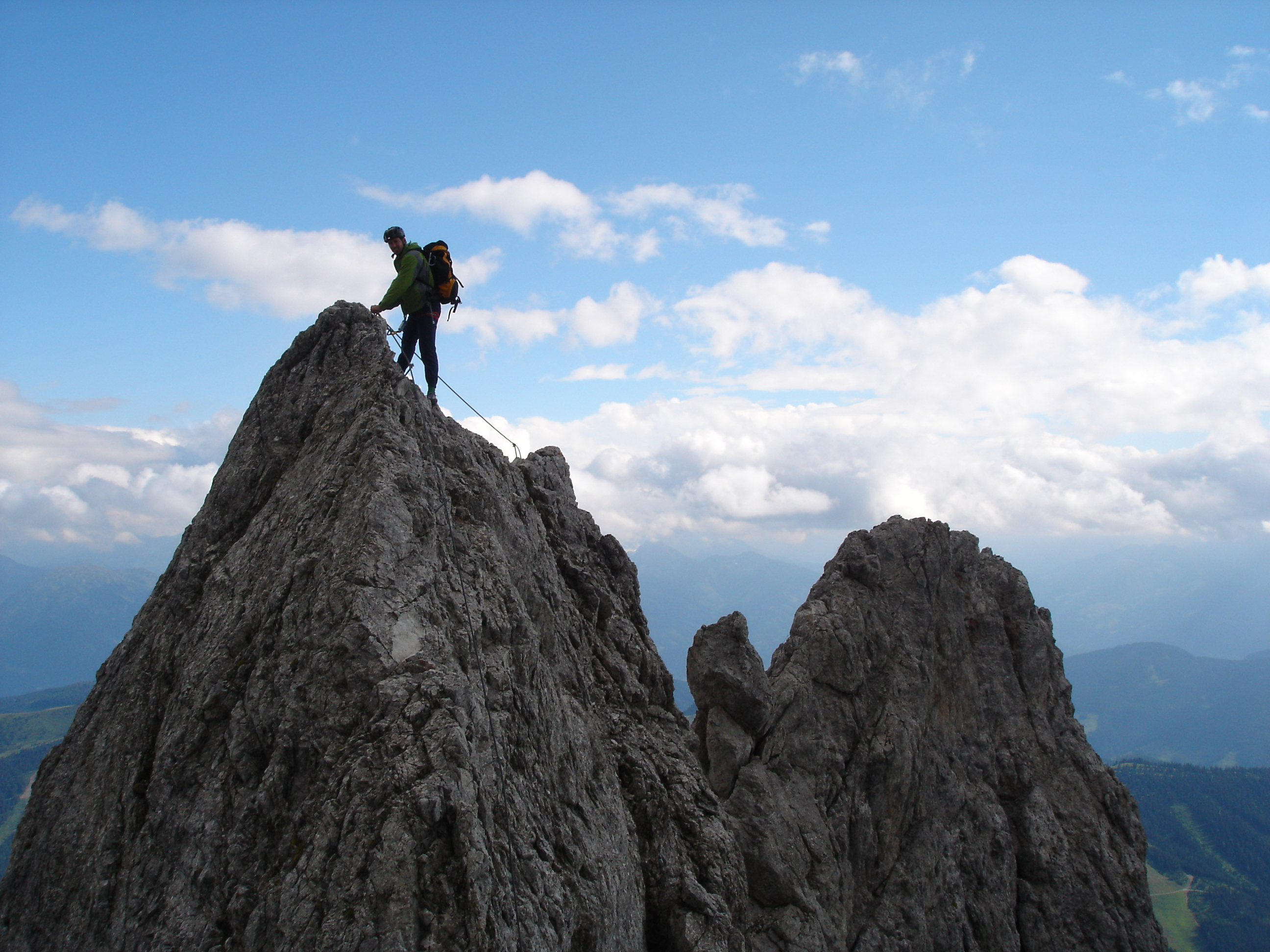 Hochkoenigsjodler Panorama